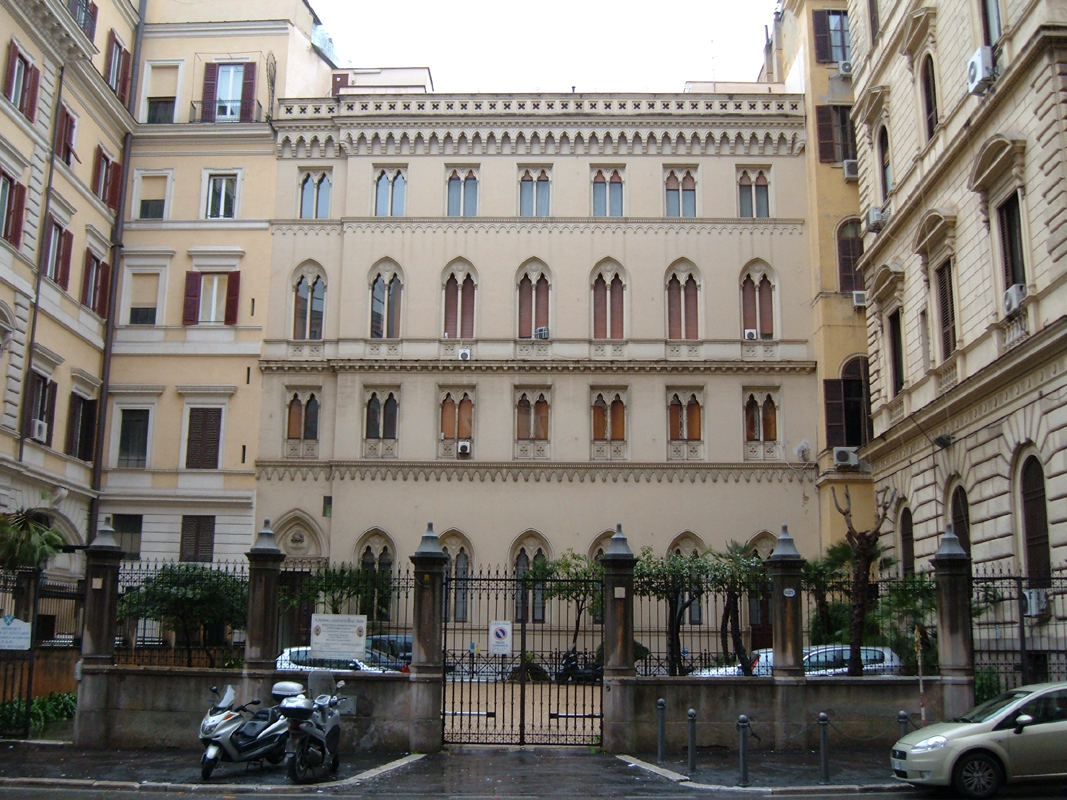 Chiesa di S. Andrea degli Scozzesi (rito presbiteriano) nel rione Trevi, a Roma, in via XX Settembre. La chiesa si trova al primo piano dell'edificio in foto.